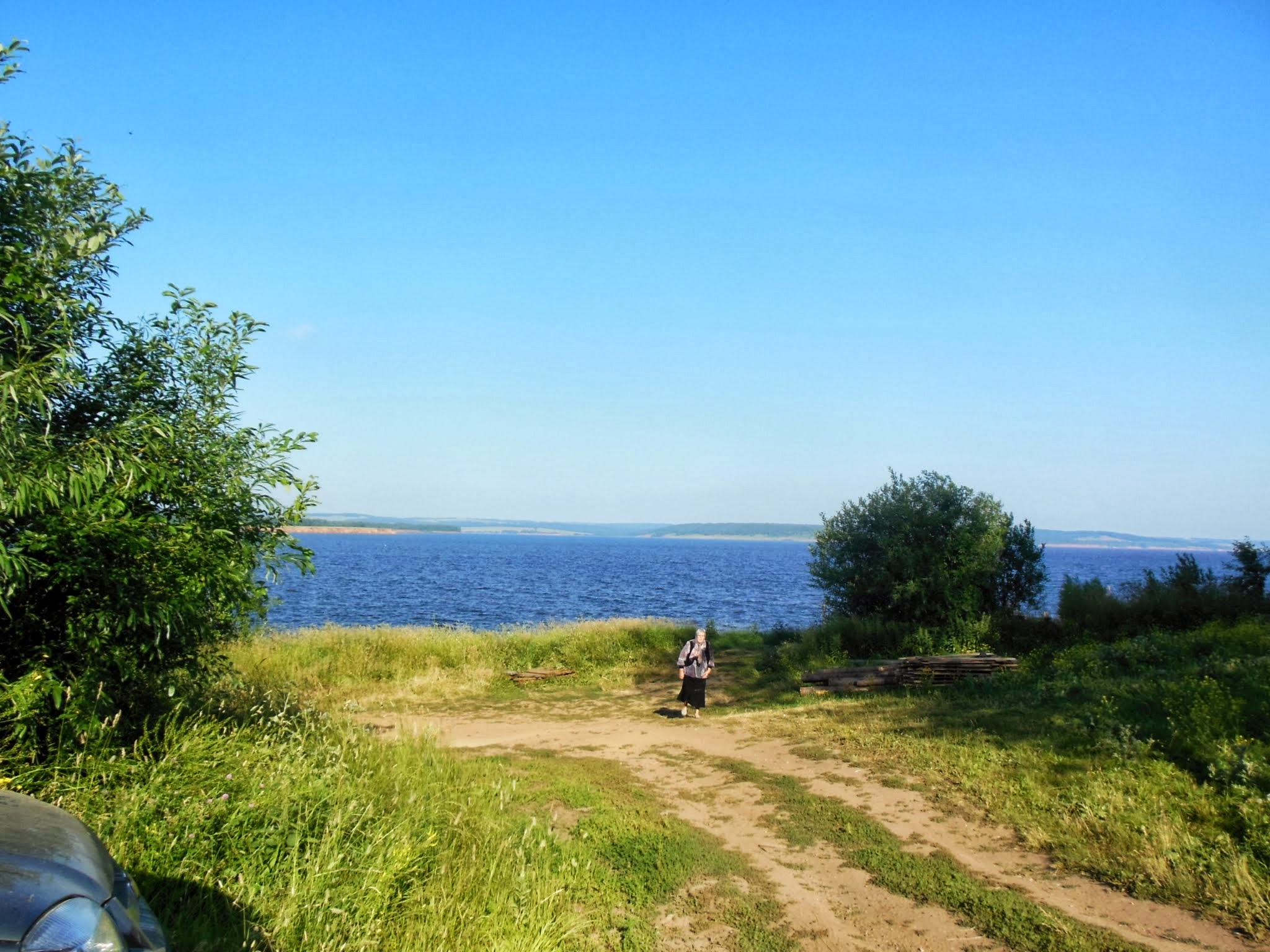 Dobryanskiy r-n, Permskiy kray, Russia